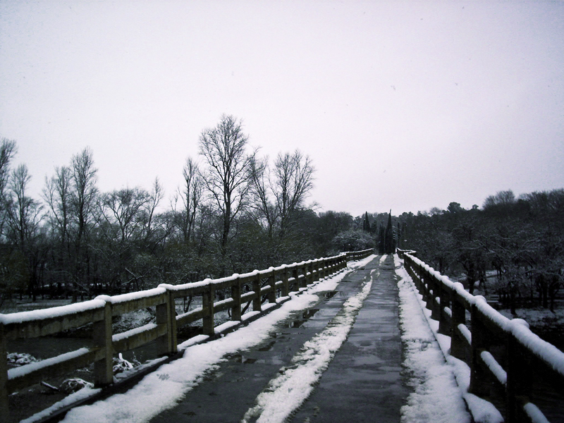 nieve en villa ascasubi